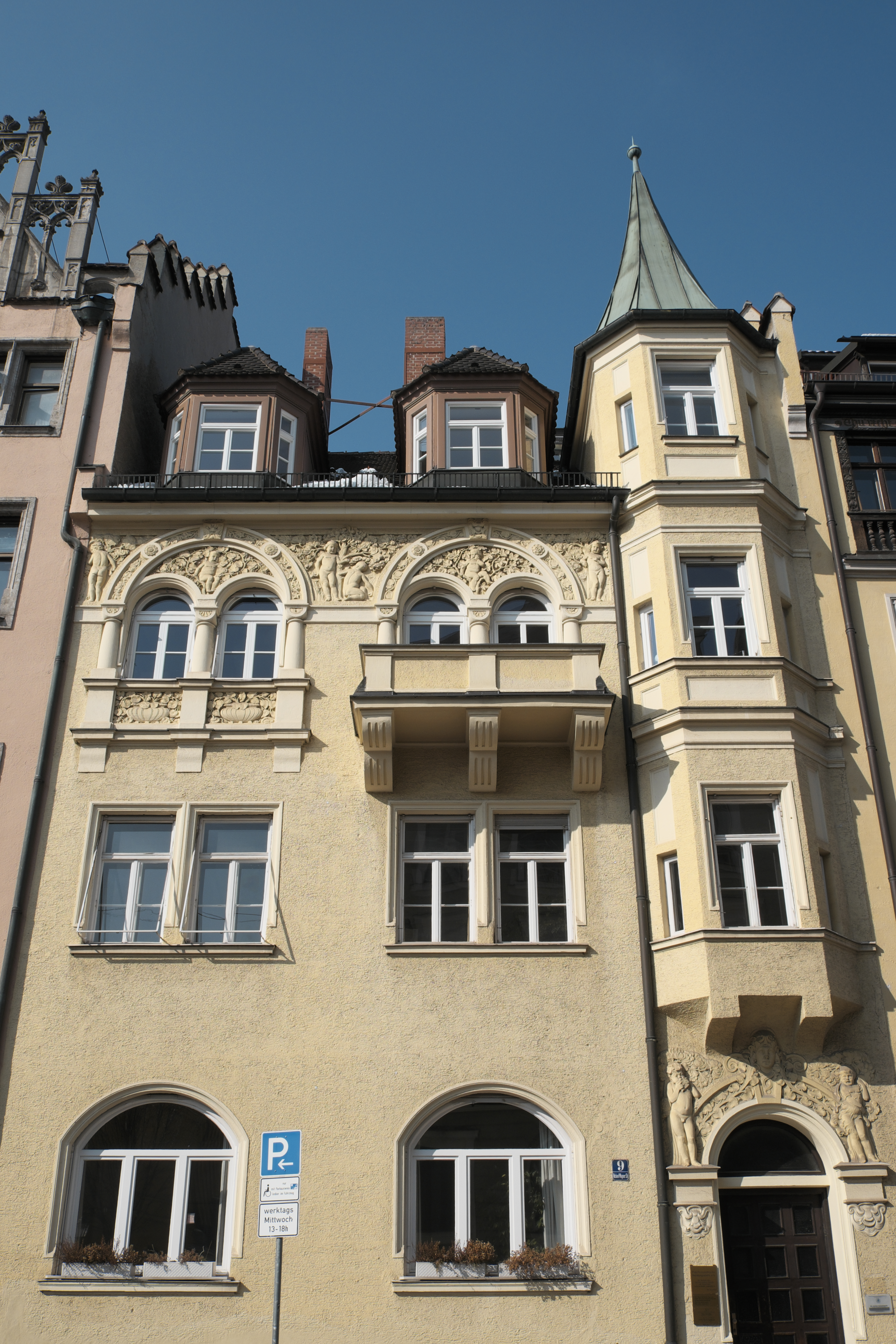 Wohnhaus in der Richard-Wagner-Straße 9 im Stadtbezirk Maxvorstad in München (Bayern/Deutschland)